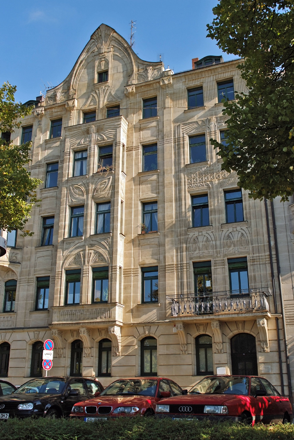 Fürth, Bavaria, Germany